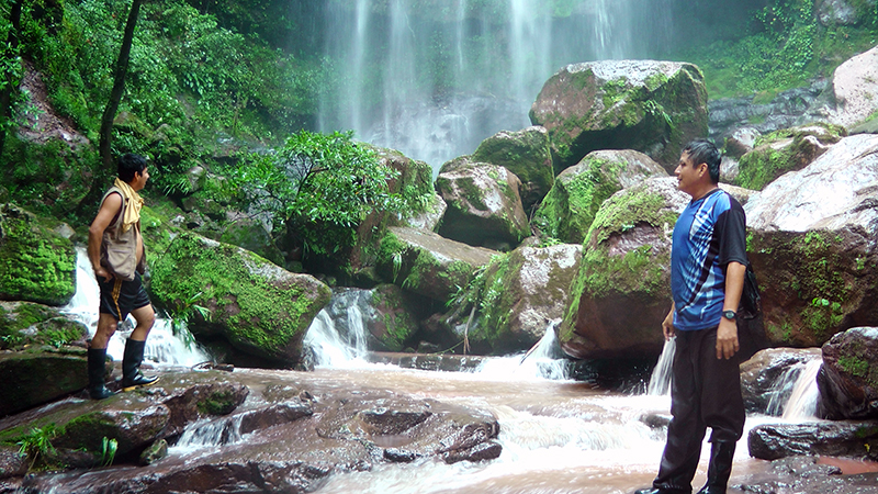 Observando la Catarata Bélgica